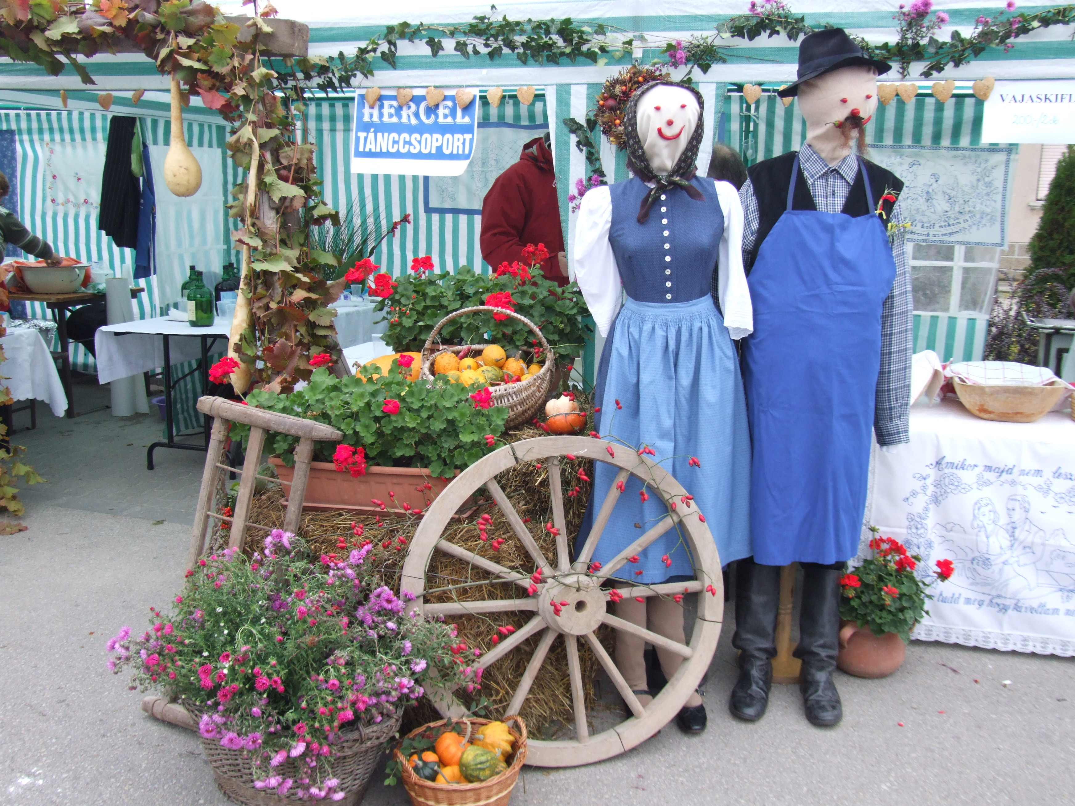 Kindergarten Hartian